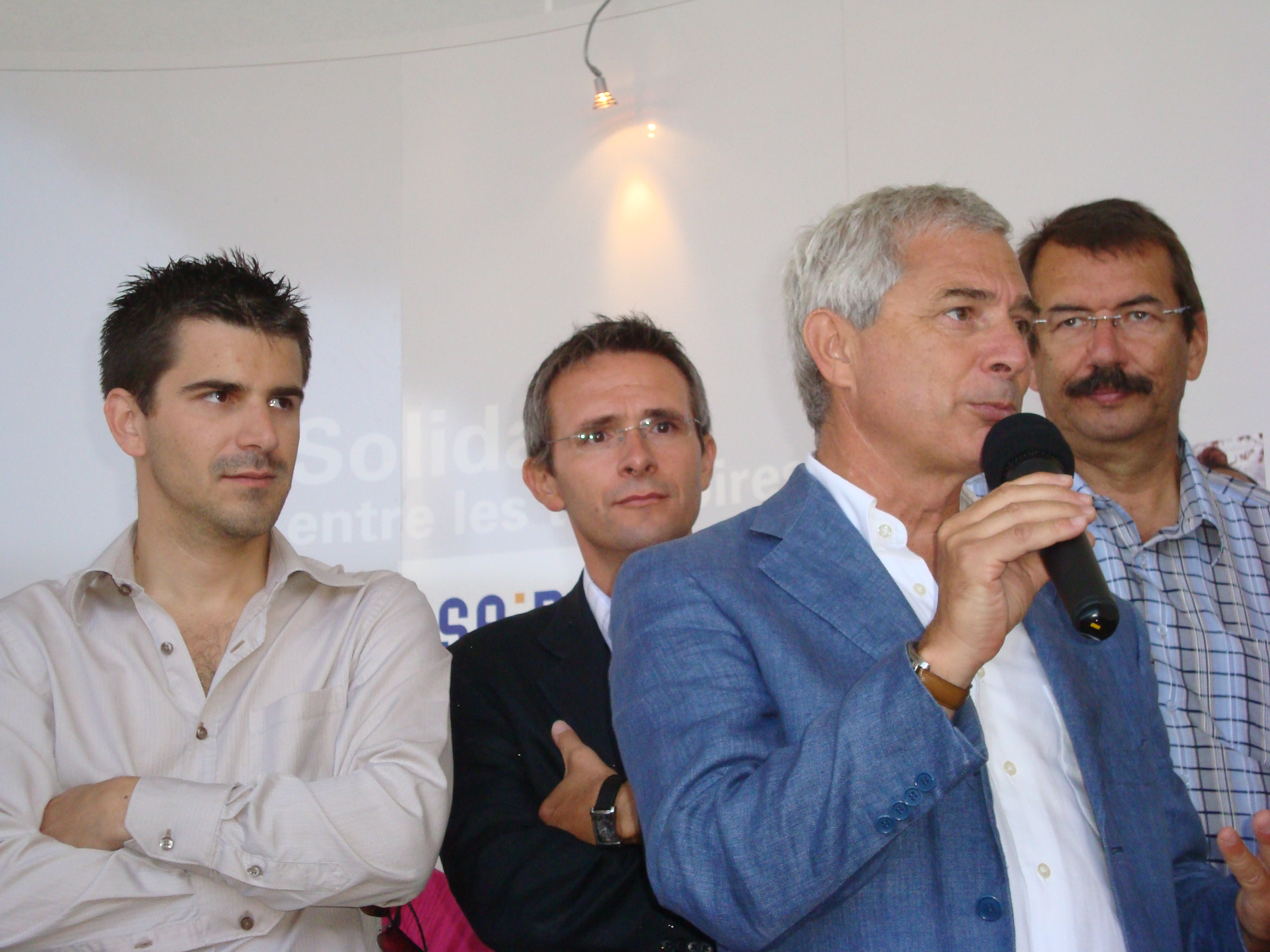 Claude Bartolone, Stéphane Troussel, Gilbert Roger et Mathieu Hanotin au stand du Conseil général de la Seine-Saint-Denis lors de la Fête de l'Humanité 2009